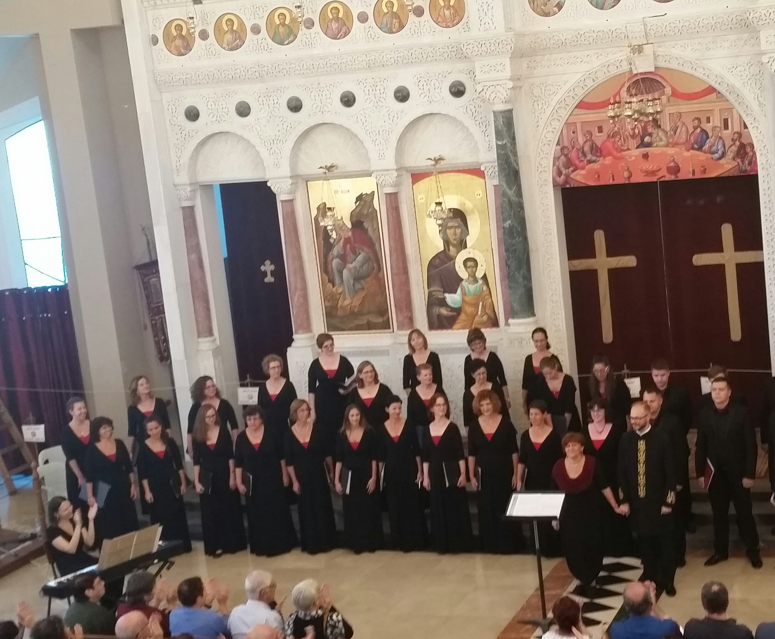 אנסמבל קולות נשים נעמה בקונצרט בכנסייה היוונית האורתודוקסית בחיפה ברחוב הפרסים, ב-13 באוקטובר 2017